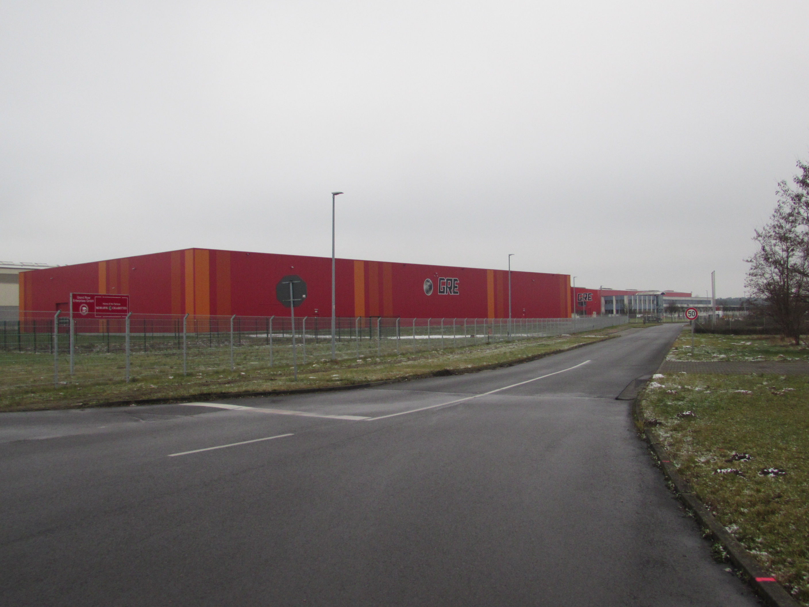 Tabakwerk Grand River Enterprises Rietz